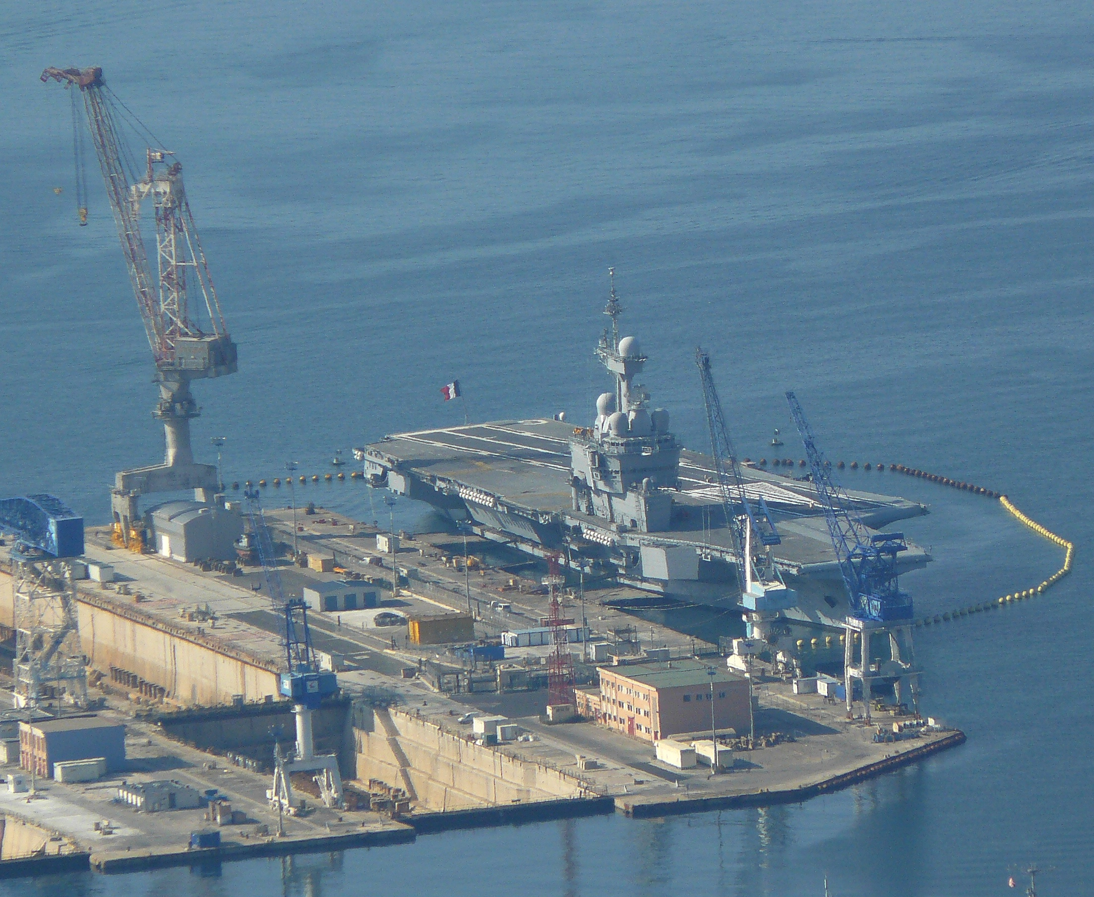 Le porte avion Charles-de-Gaulle à quai à l'arsenal de Toulon, lors d'une période de réparation et de maintenance. Vue prise du Mont Faron.